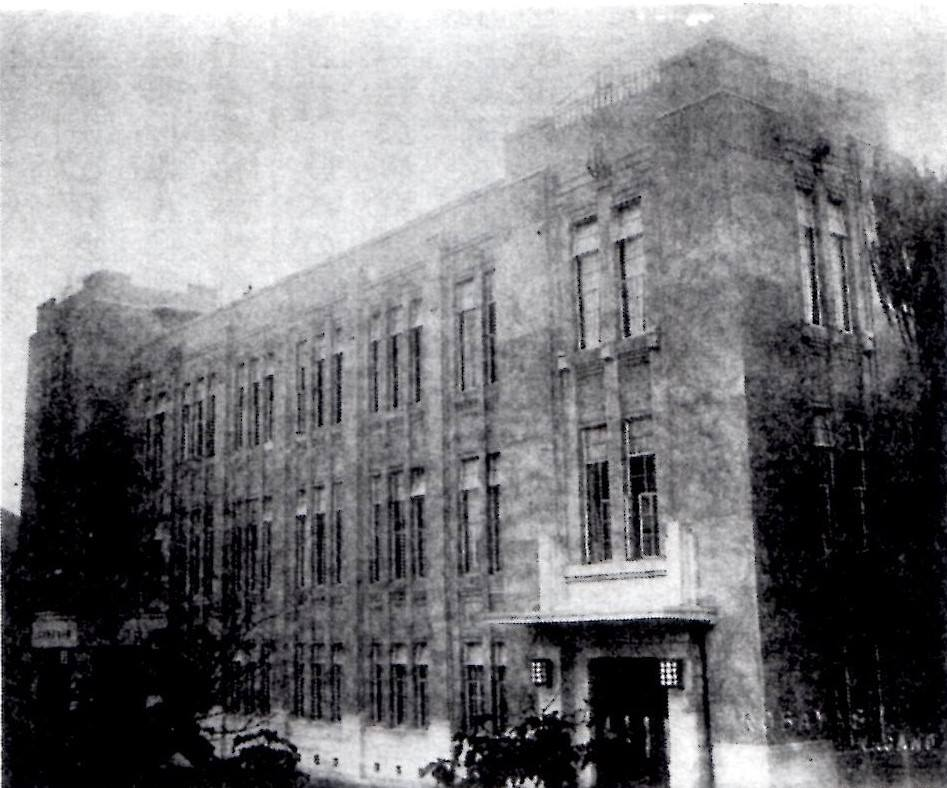 長野市長門町にあった県立長野図書館。1929年の開館当時。